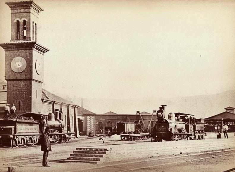 Fotos históricas de Valparaíso en Chile